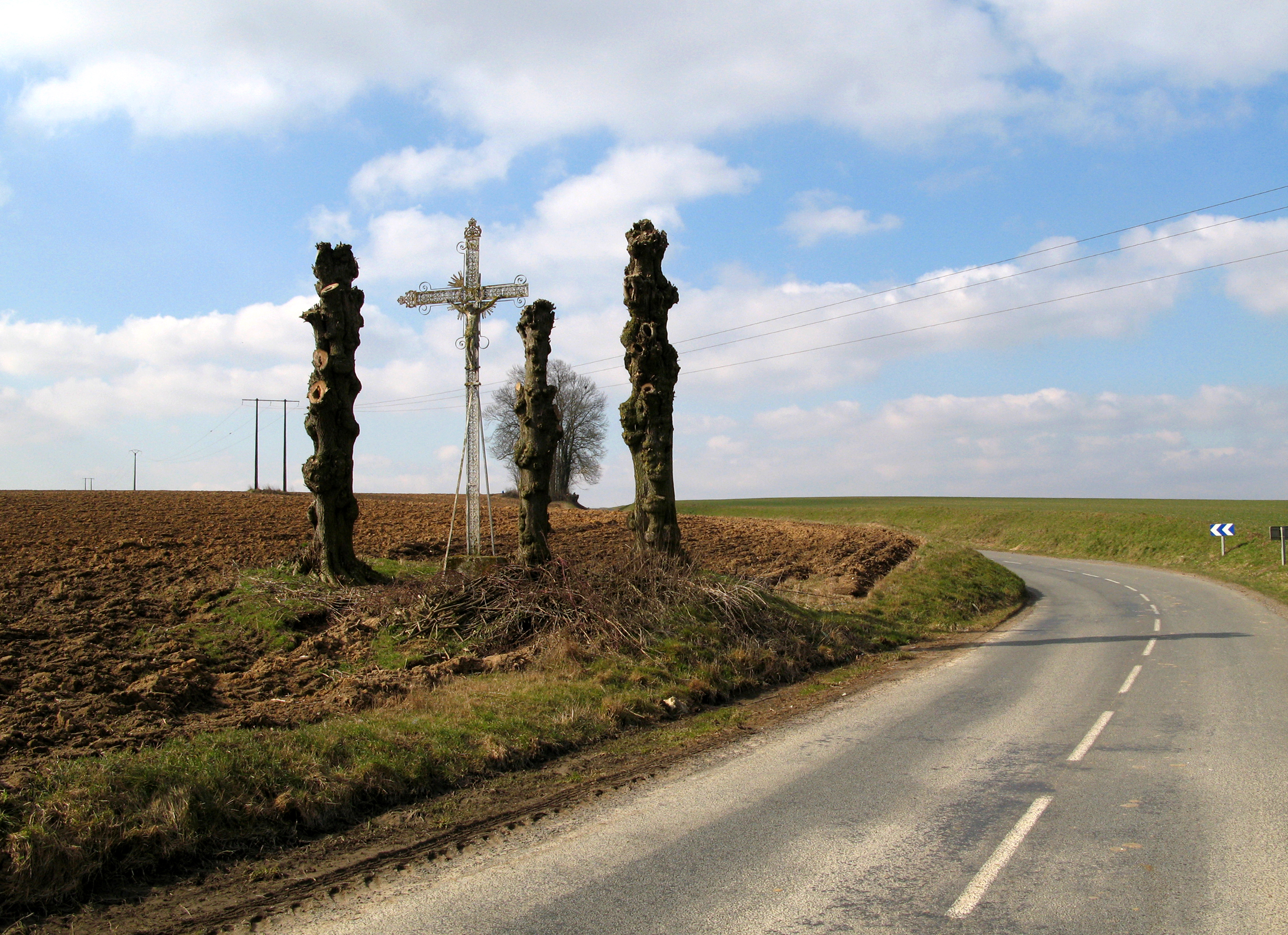 Léalvillers (Somme, France) - Le calvaire, à l'écart du village (au Nord-Ouest), en allant vers le hameau de Belle-Église, sur la route d'Arquèves. .